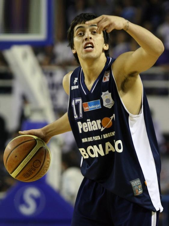 El jugador de básquetbol Facundo Campazzo, jugando para Peñarol de Mar del Plata.